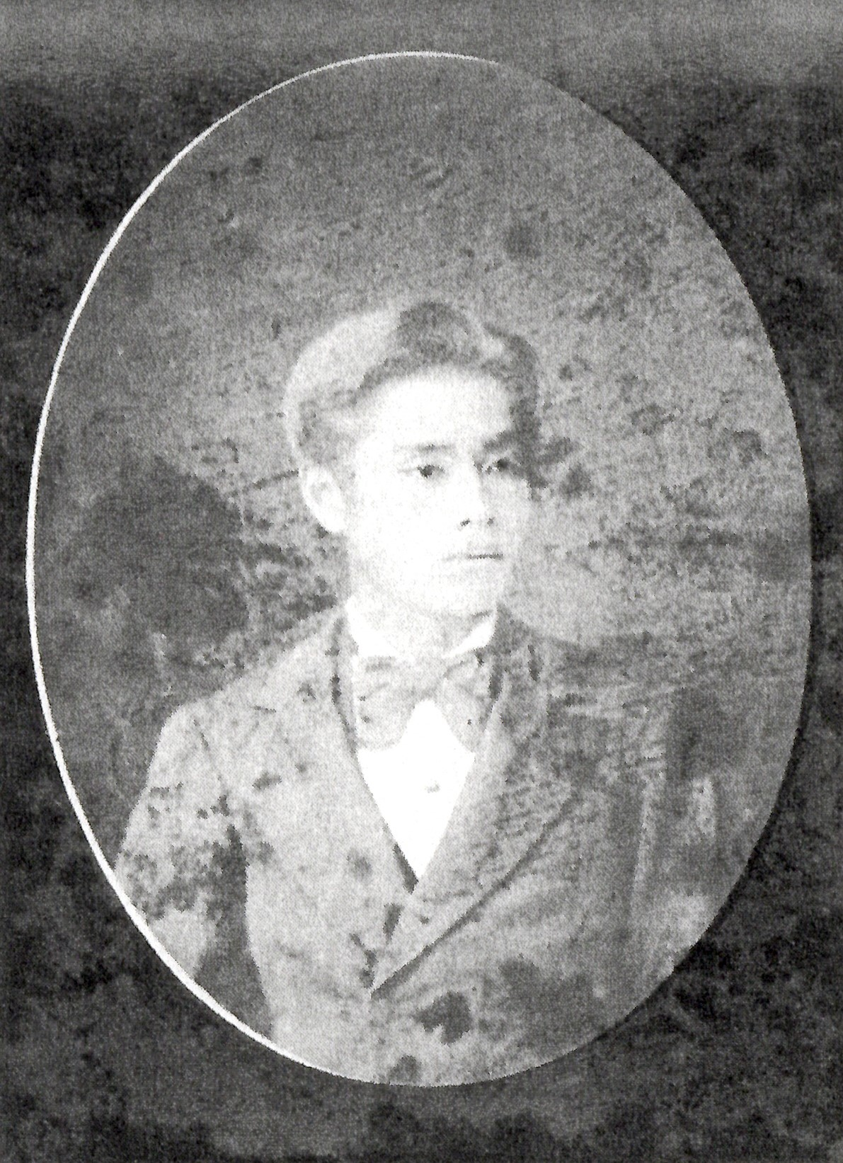 千種有冬の肖像写真。